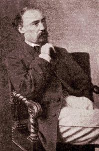 Портрет Н.А. Некрасова